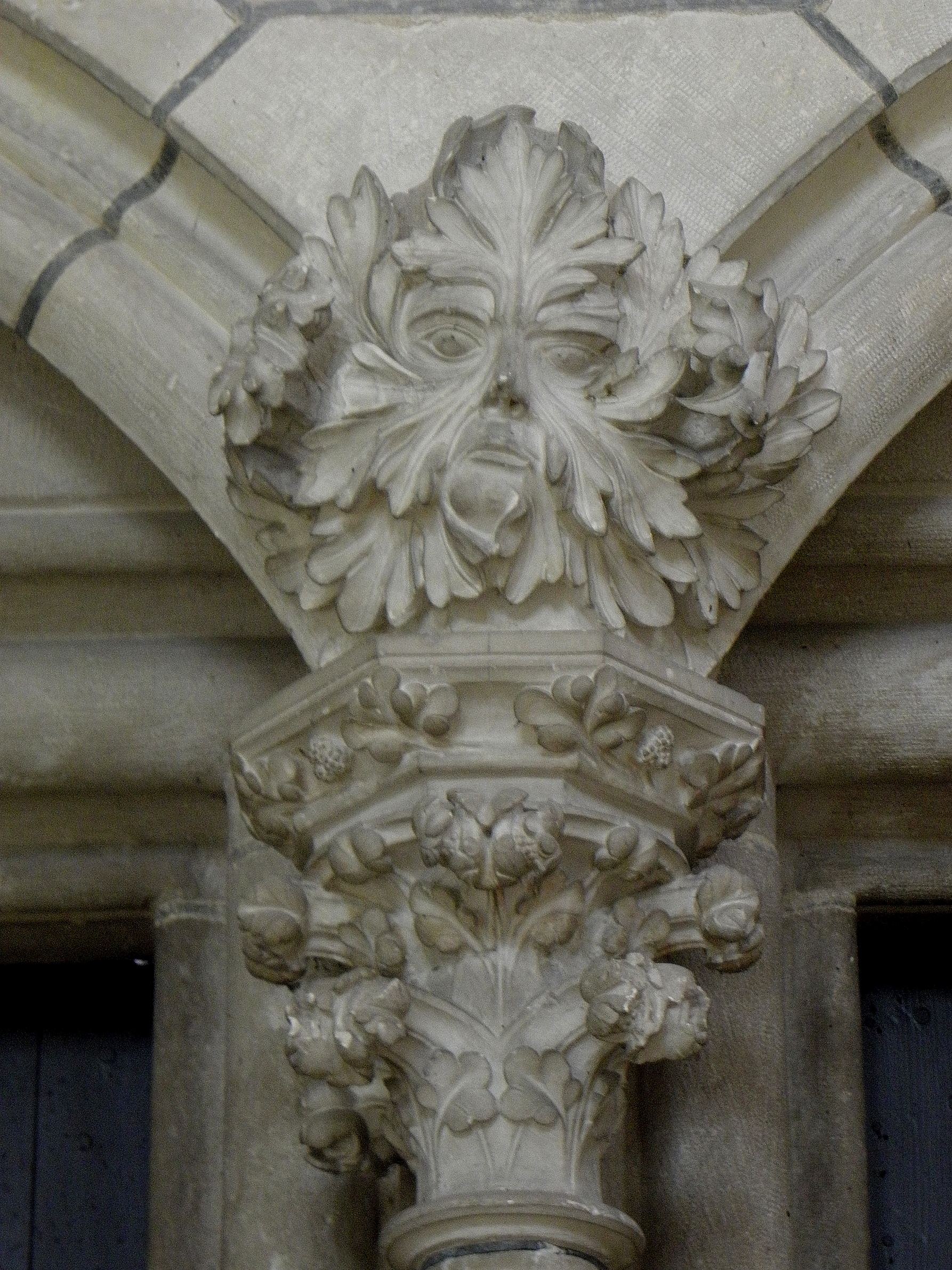 Intérieur de la cathédrale Saint-Étienne d'Auxerre (89).